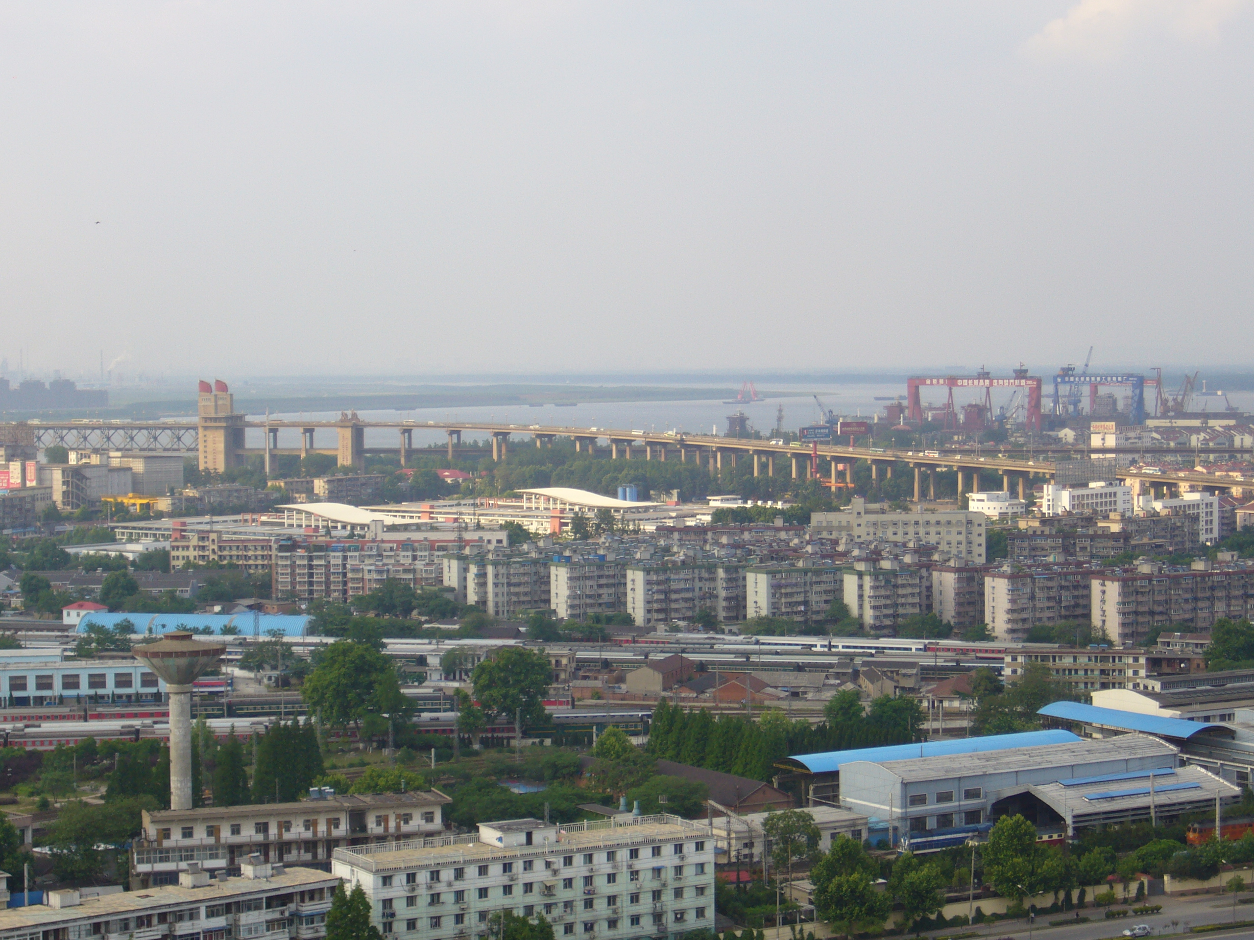 一桥飞架南北